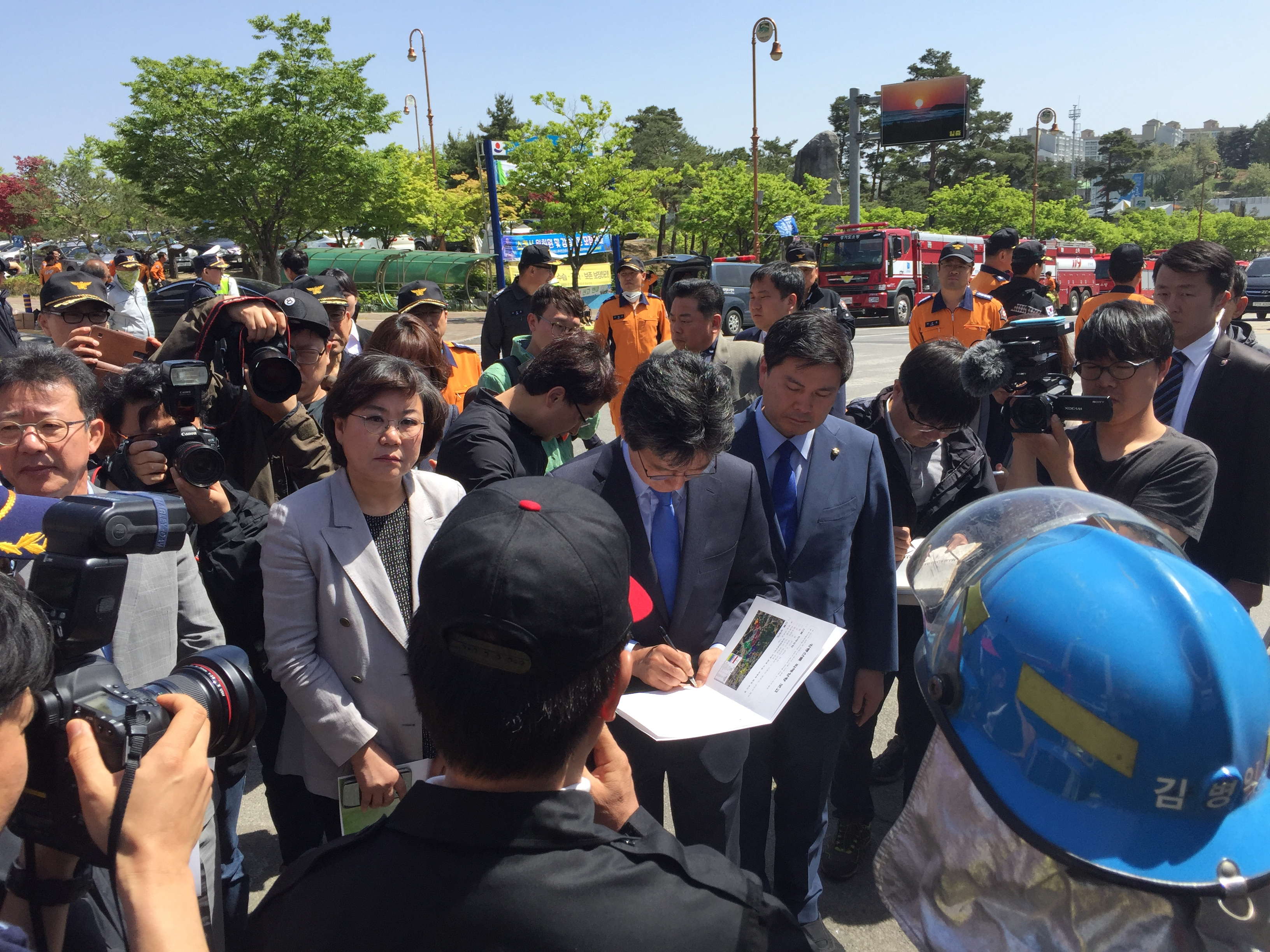 2017년 5월 강릉 산불